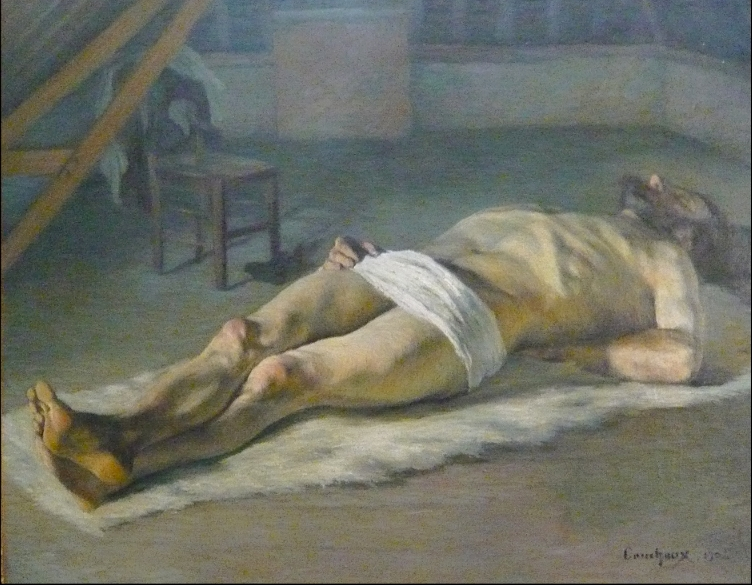 étude de nu masculin, huile sur toile 81,5 x 100 cm par Marcel Couchaux (1877-1939). Musée Nicolas Poussin (Les Andelys, Eure, France).